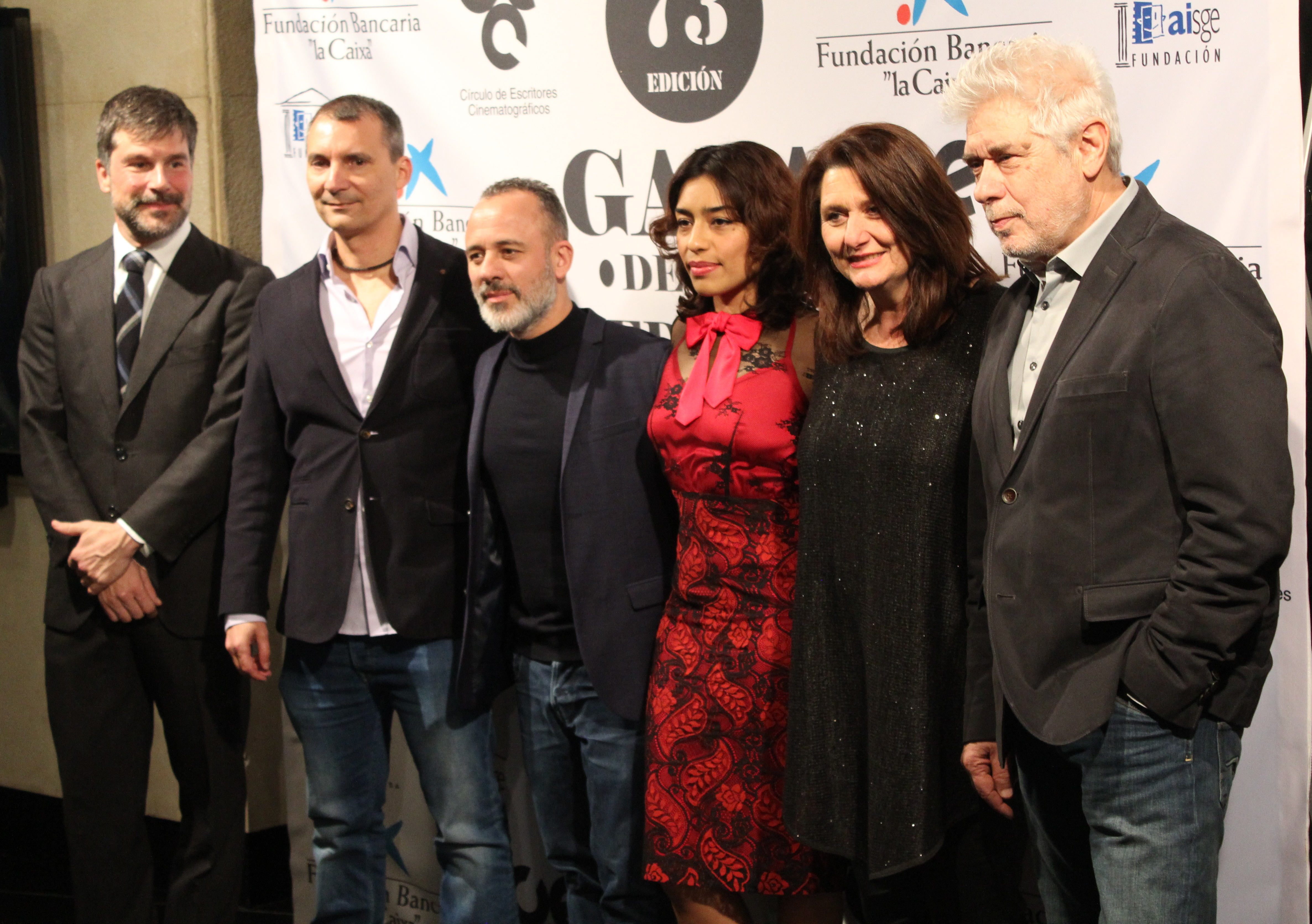 El productor David Naranjo, el guionista Alejandro Hernández, el actor Javier Gutiérrez, las actrices Adriana Paz y Adelfa Calvo y el productor José Nolla, integrantes del equipo de la película El autor posando en la 73 edición de las Medallas del Círculo de Escritores Cinematográficos.